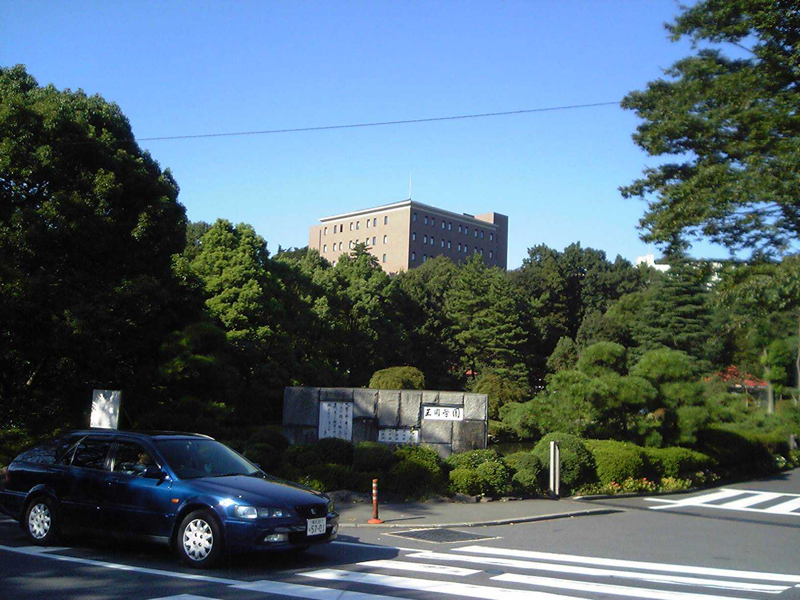 玉川大学（2006年10月9日投稿者が撮影）